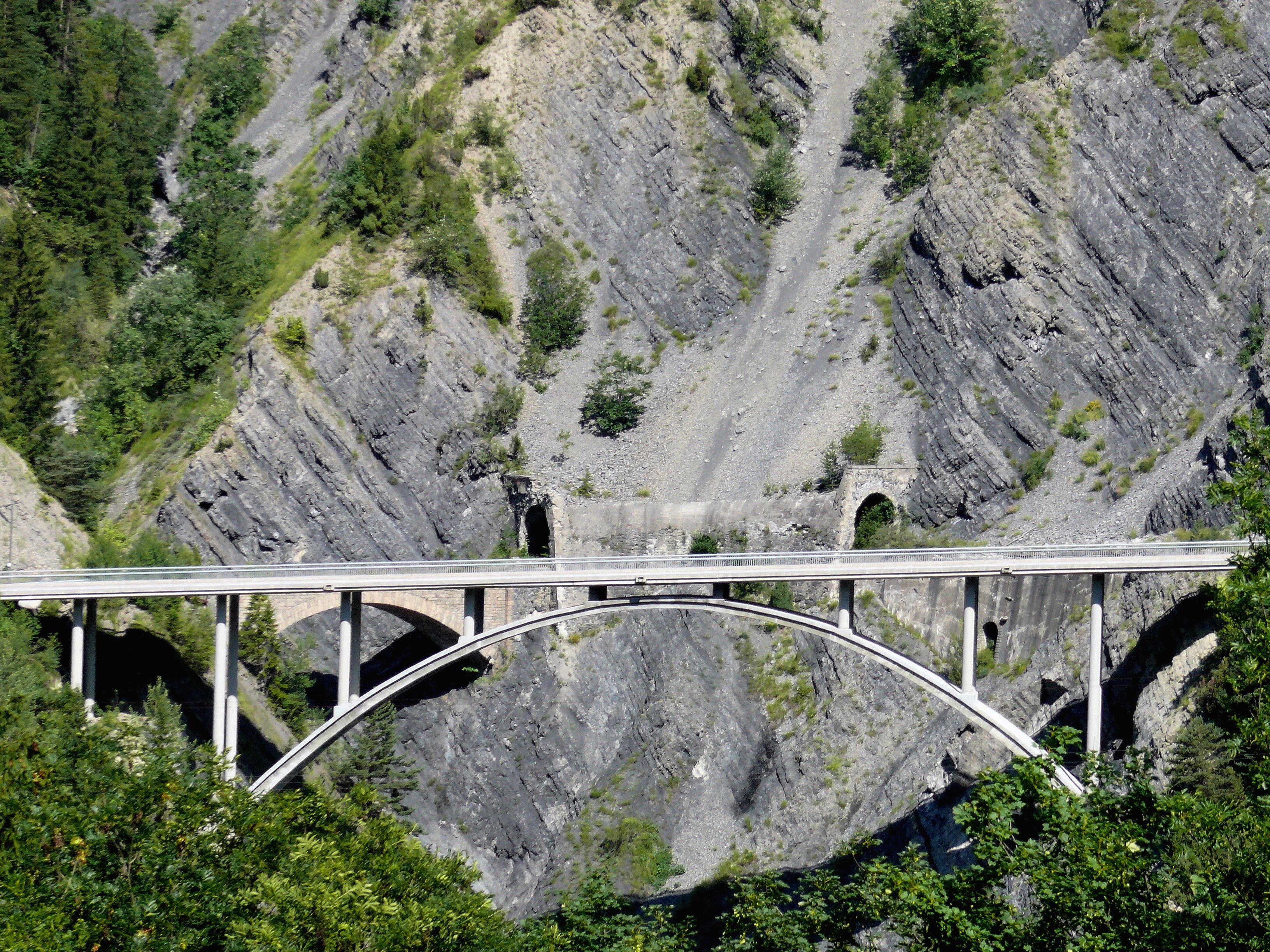 Saint-Jean-d'Arves - Viaduc des Sallanches (1990)